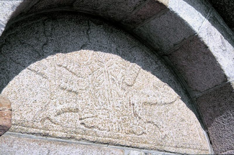 Rybjerg Kirke, (Skive Kommune), Tympanon over sydportalen